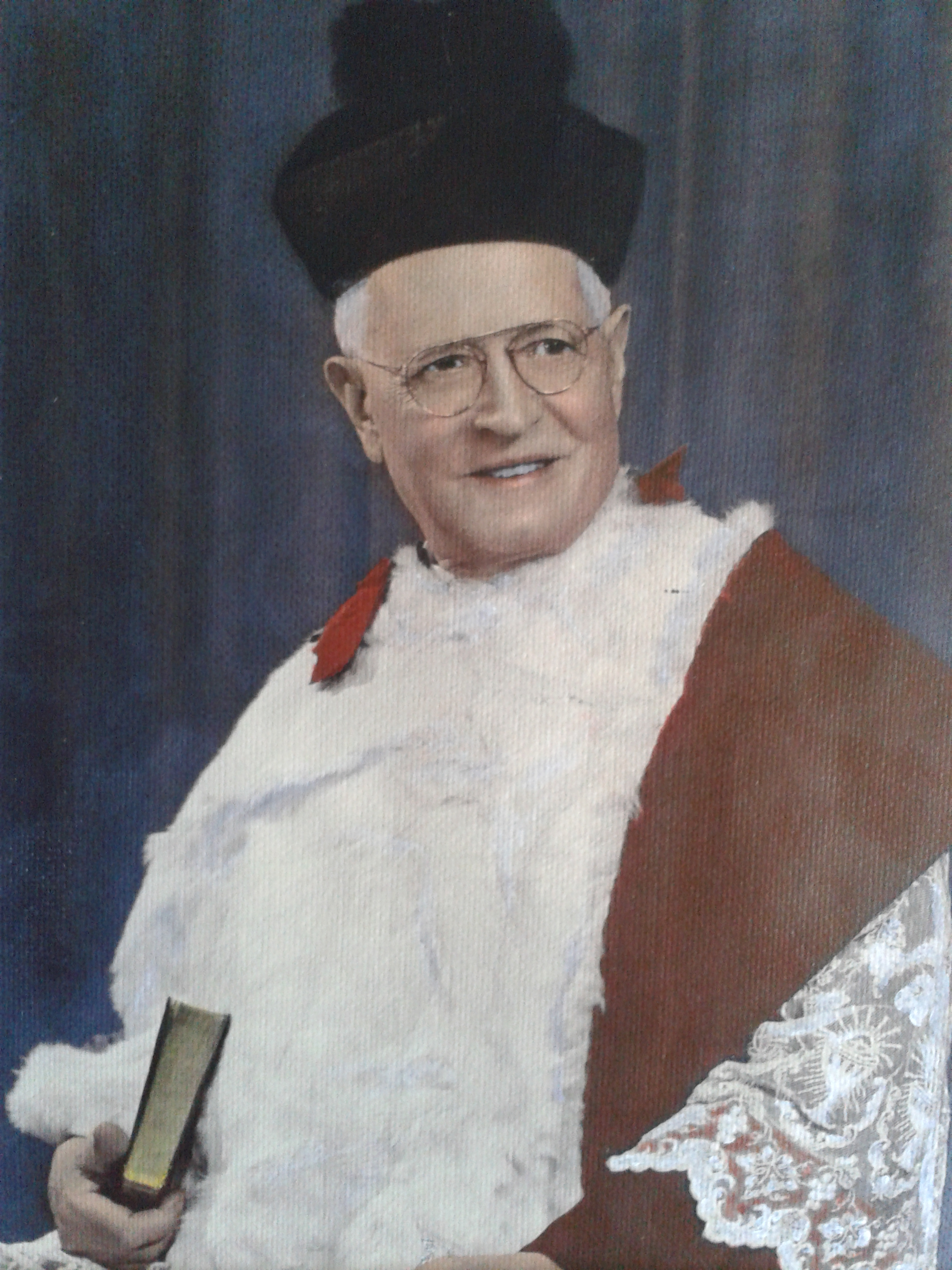 Canonico Prof. Giovanni Daraio